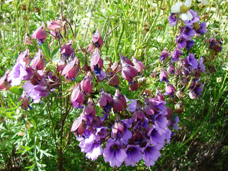 Tropaeolum hookerianum ssp. atropurpureum, especie muy escasa que crece en Huentelauquén